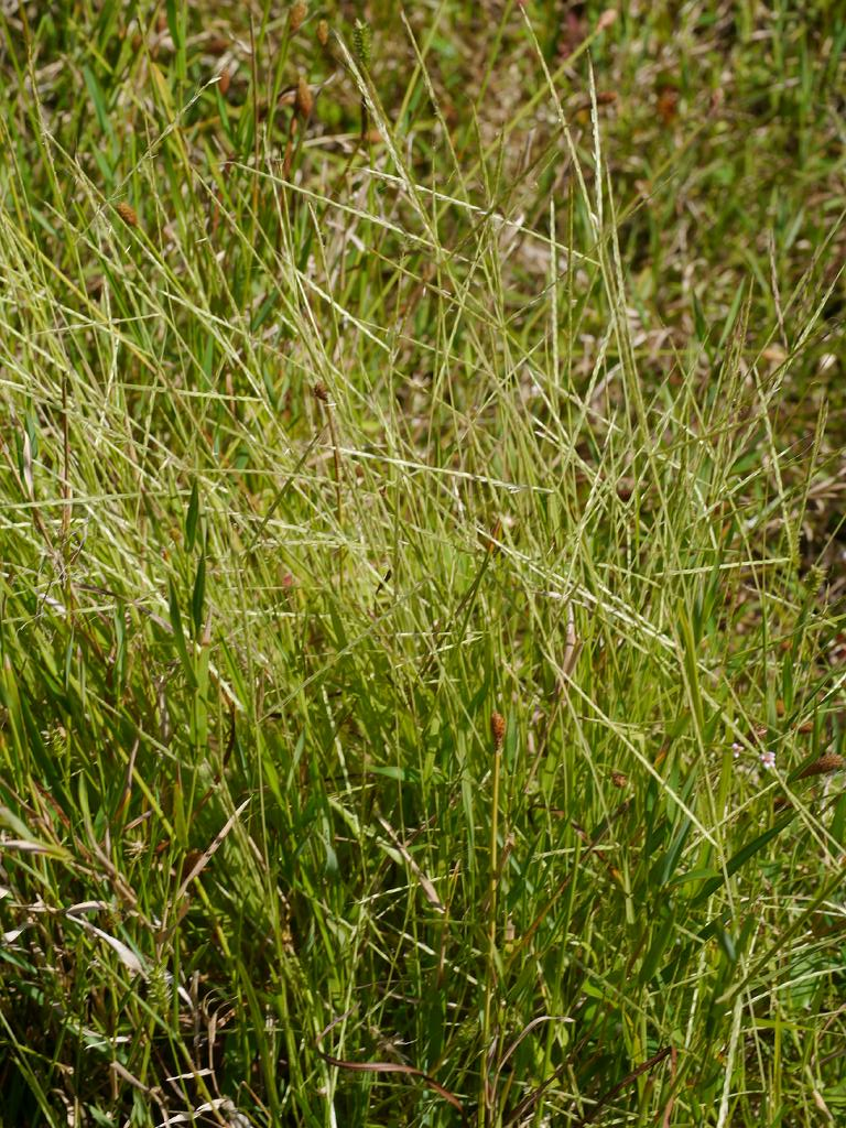 Dimeria ornithopoda(poaceae) カリマタガヤ(イネ科) 2013年10月13日 和歌山県串本町 Kusimoto town, Wakayama pref. Japan